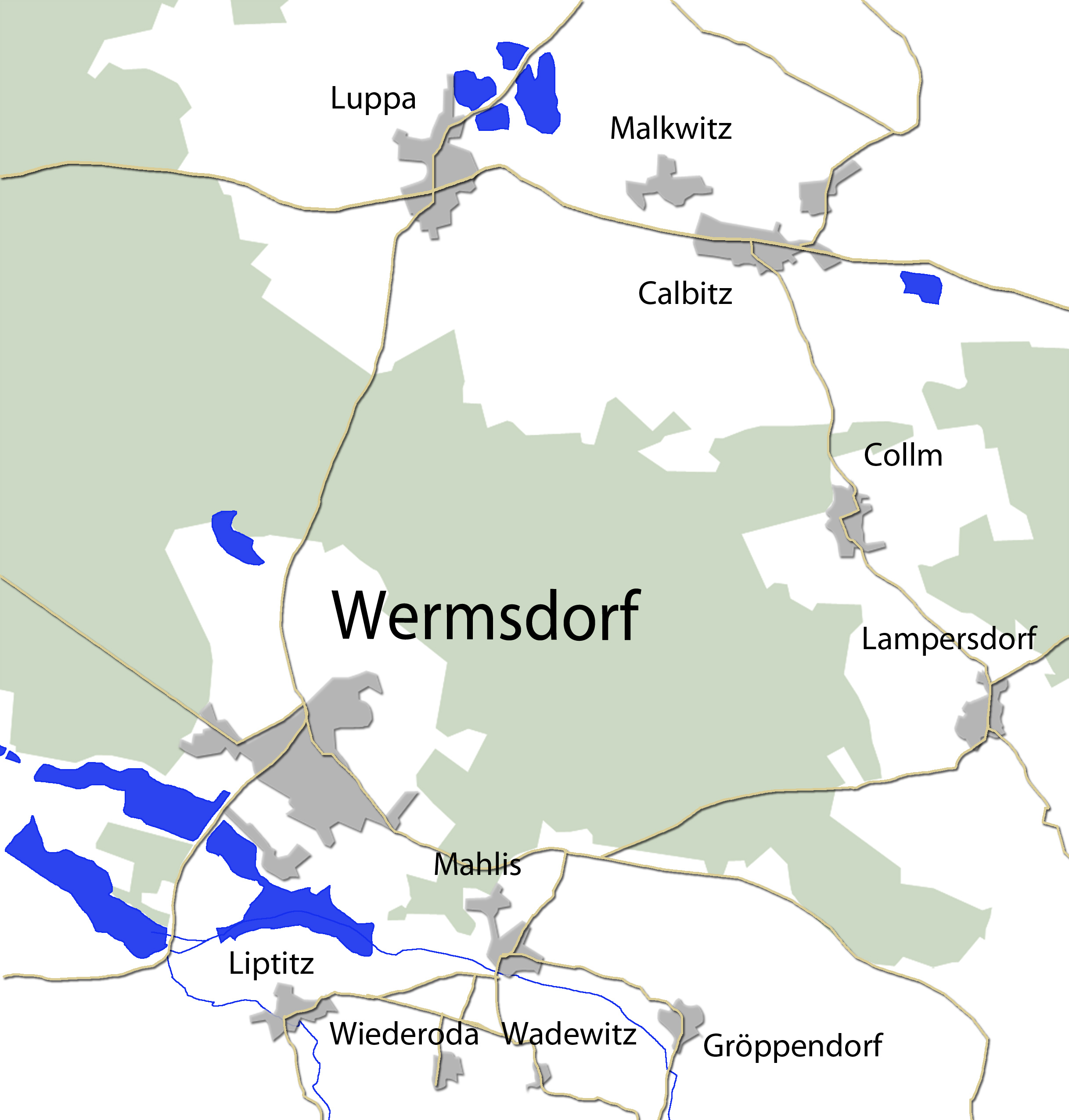 Wermsdorf und seine Ortsteile in Sachsen